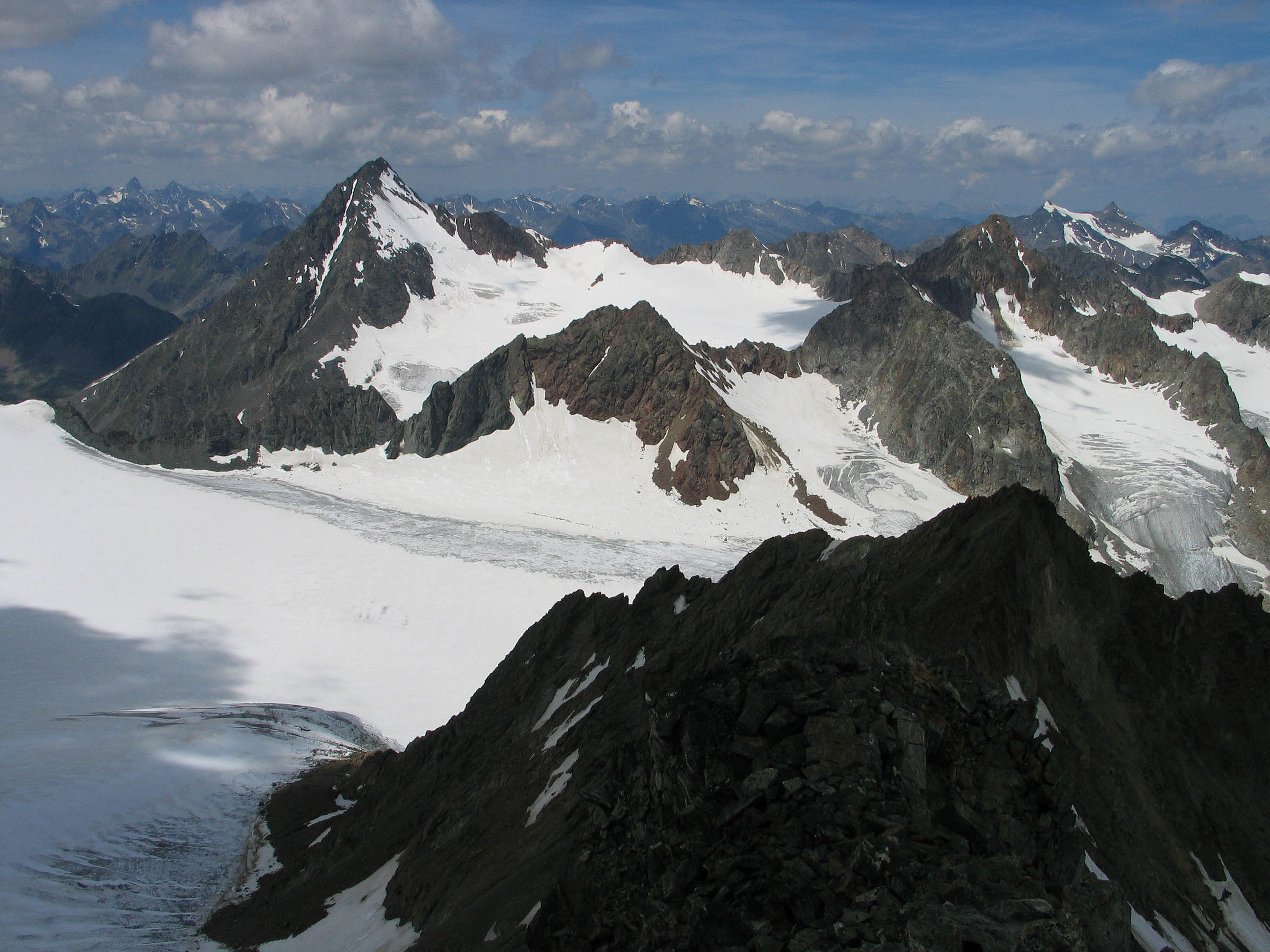 Schrankogel von der Ruderhofspitze, Stubaier Alpen